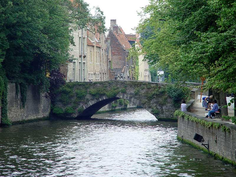 Beschreibung: Brugge, Brücke über Gracht Aufnahmedatum: 27. August 2002 Fotograf: ArtMechanic